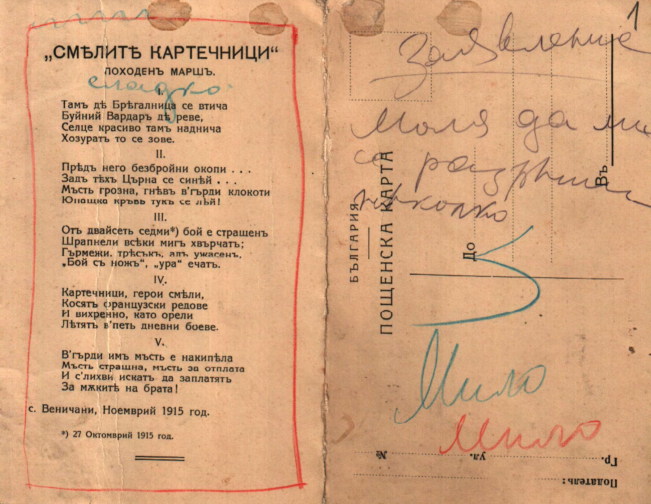 „Смелите картечници“, походен марш на картечната рота от 3-и Пехотен Македонски полк